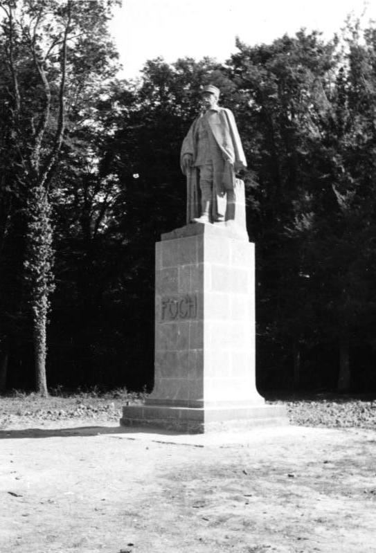 Foche-Denkmal im Walde von Compiègne 1940